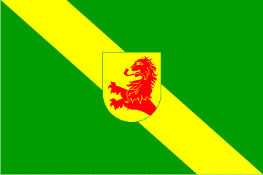 Bandera de Valdés